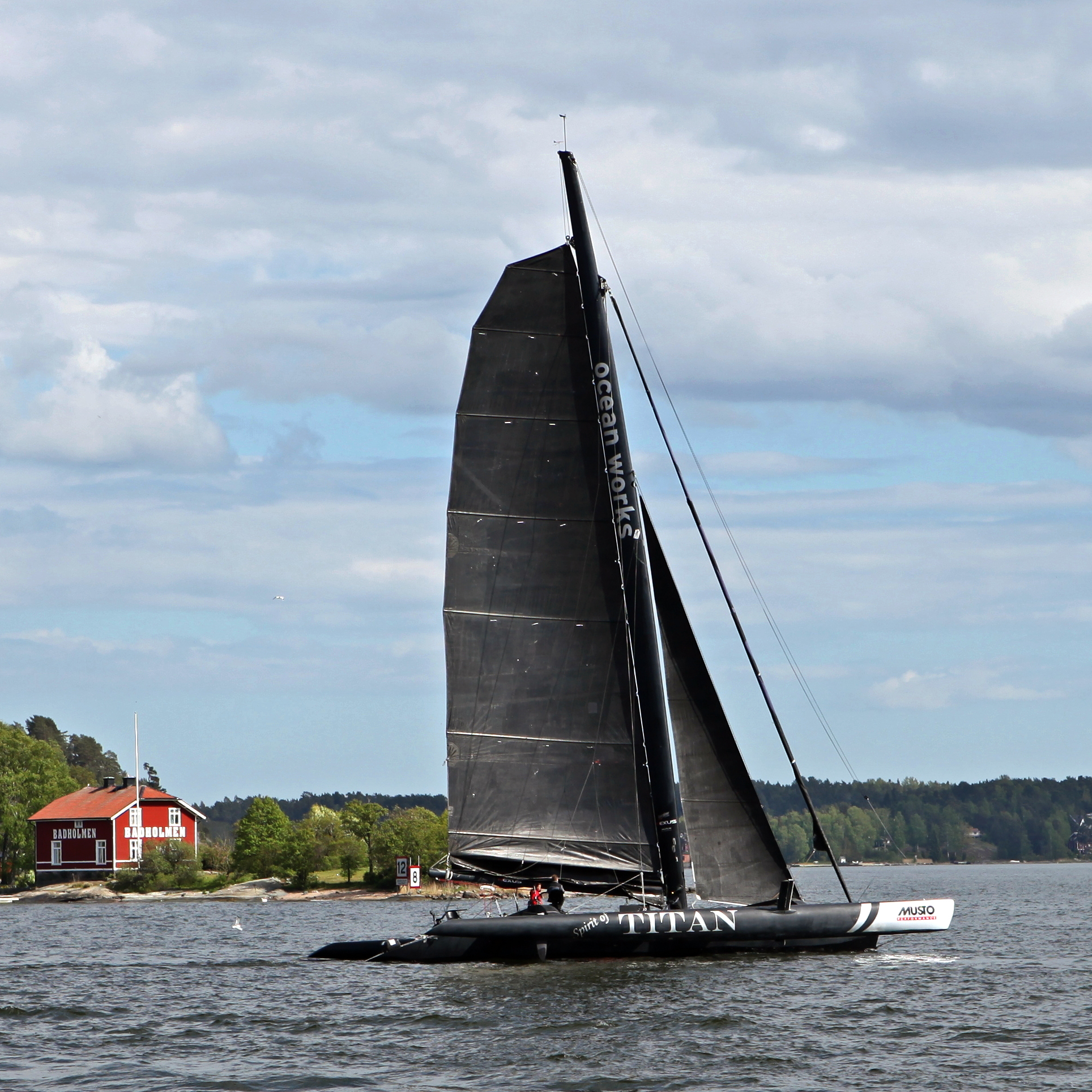 Boats in Sweden